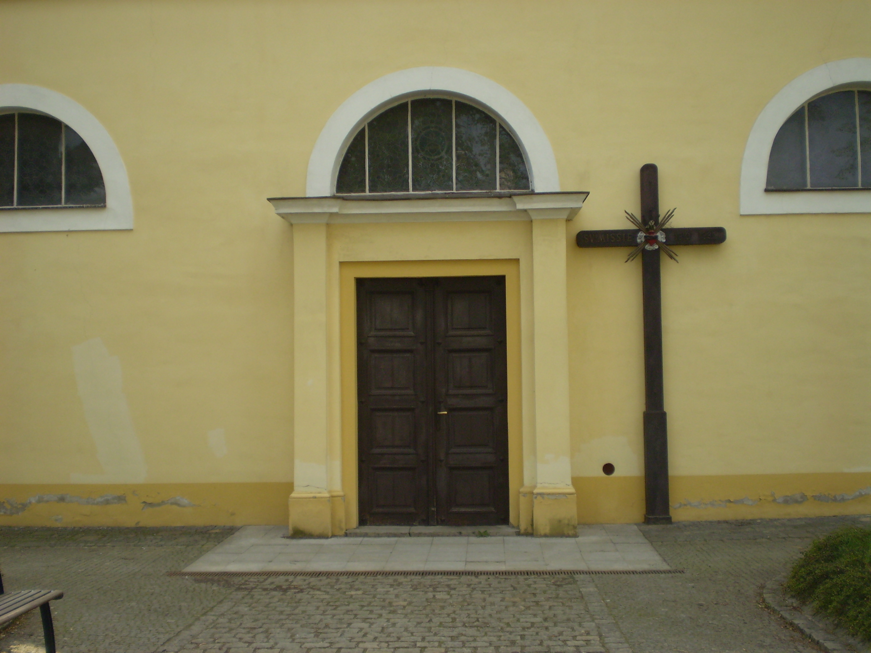 Kostel sv. Jana Křtitele a Jana Evangelisty v Brně-Bystrci. Dřevěný kříž vedle bočního vchodu do kostela.